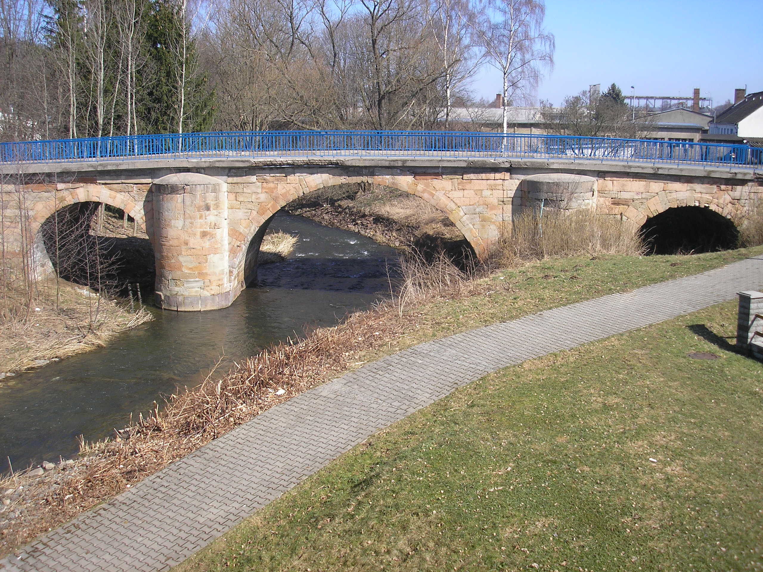 Eine alte Brücke über die Sprotte in Schmölln (Thüringen).